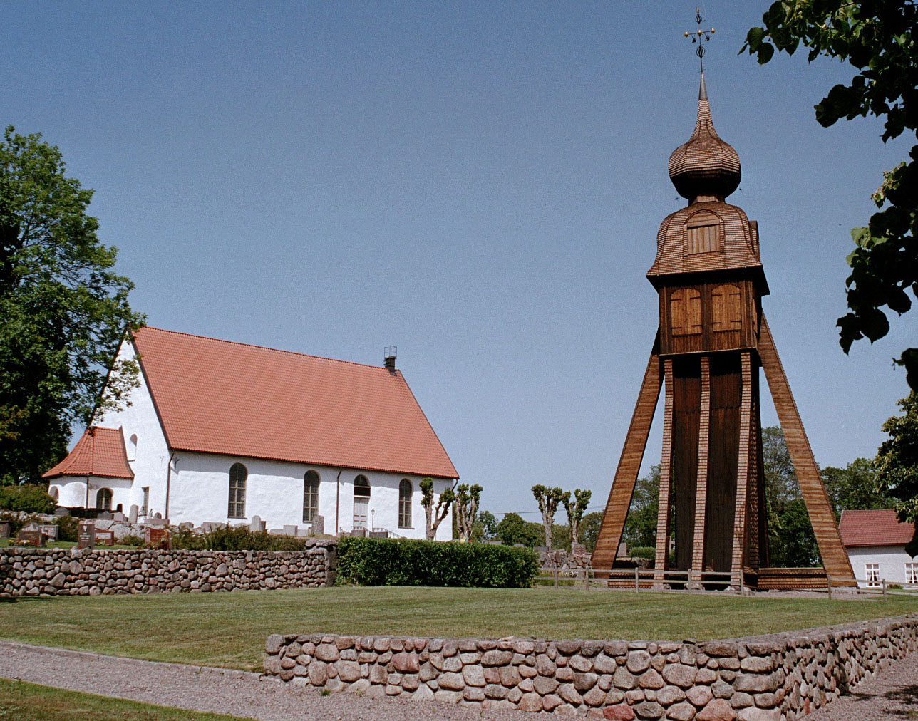 Karlstorps kyrka och klockstapel